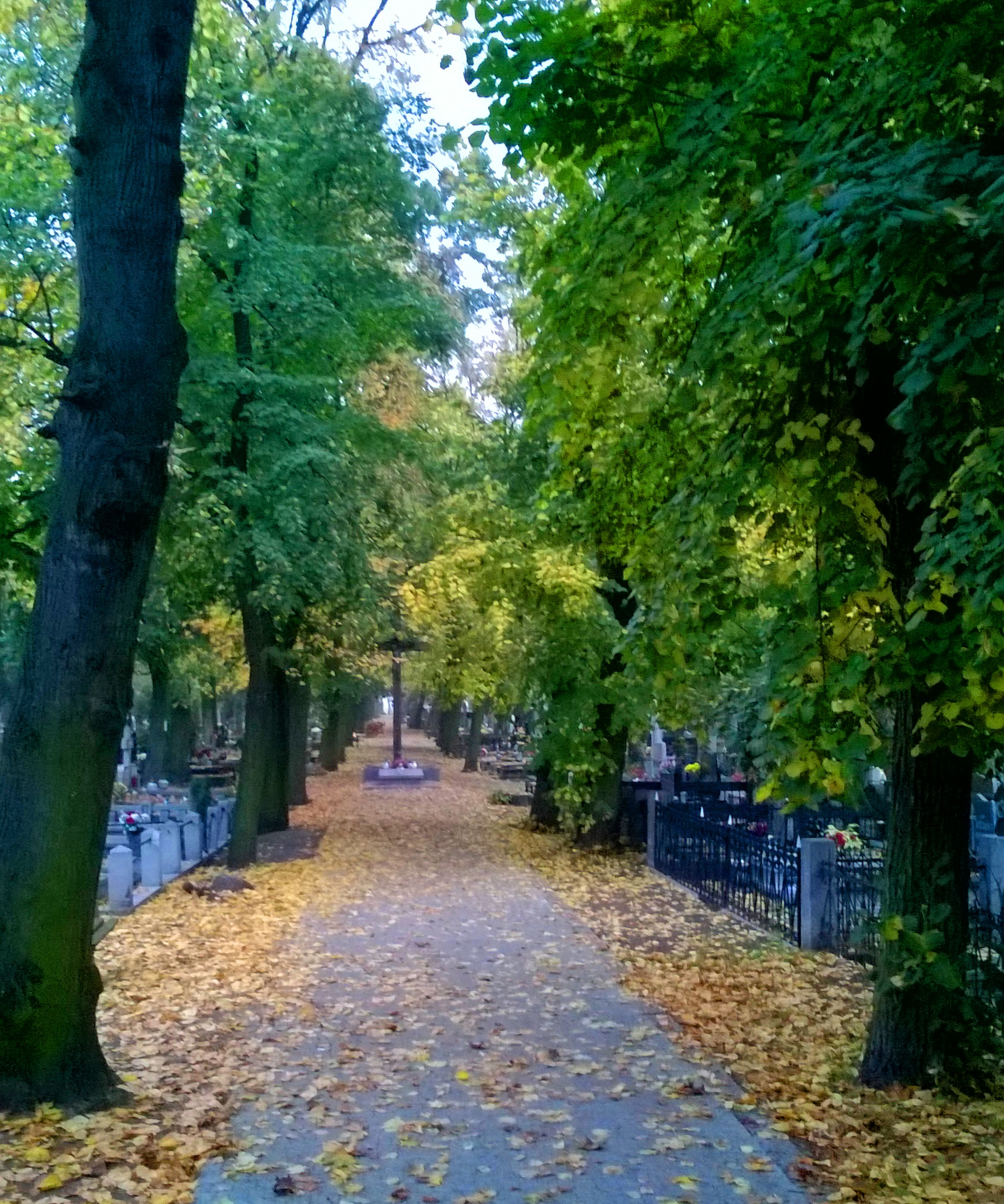 Cmentarz Najświętszej Marii Panny w Toruniu, jesień 2017